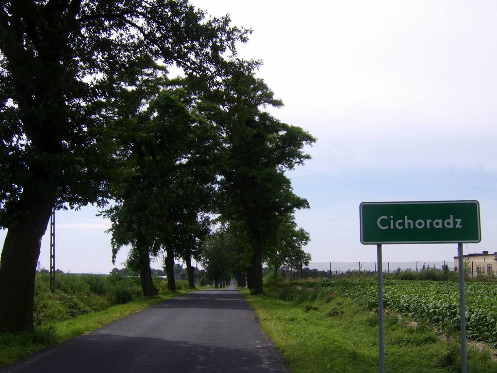 Wieś Cichoradz